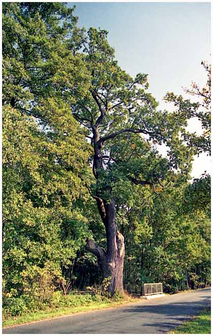 Dub u silnice z Přelouče do Klenovky